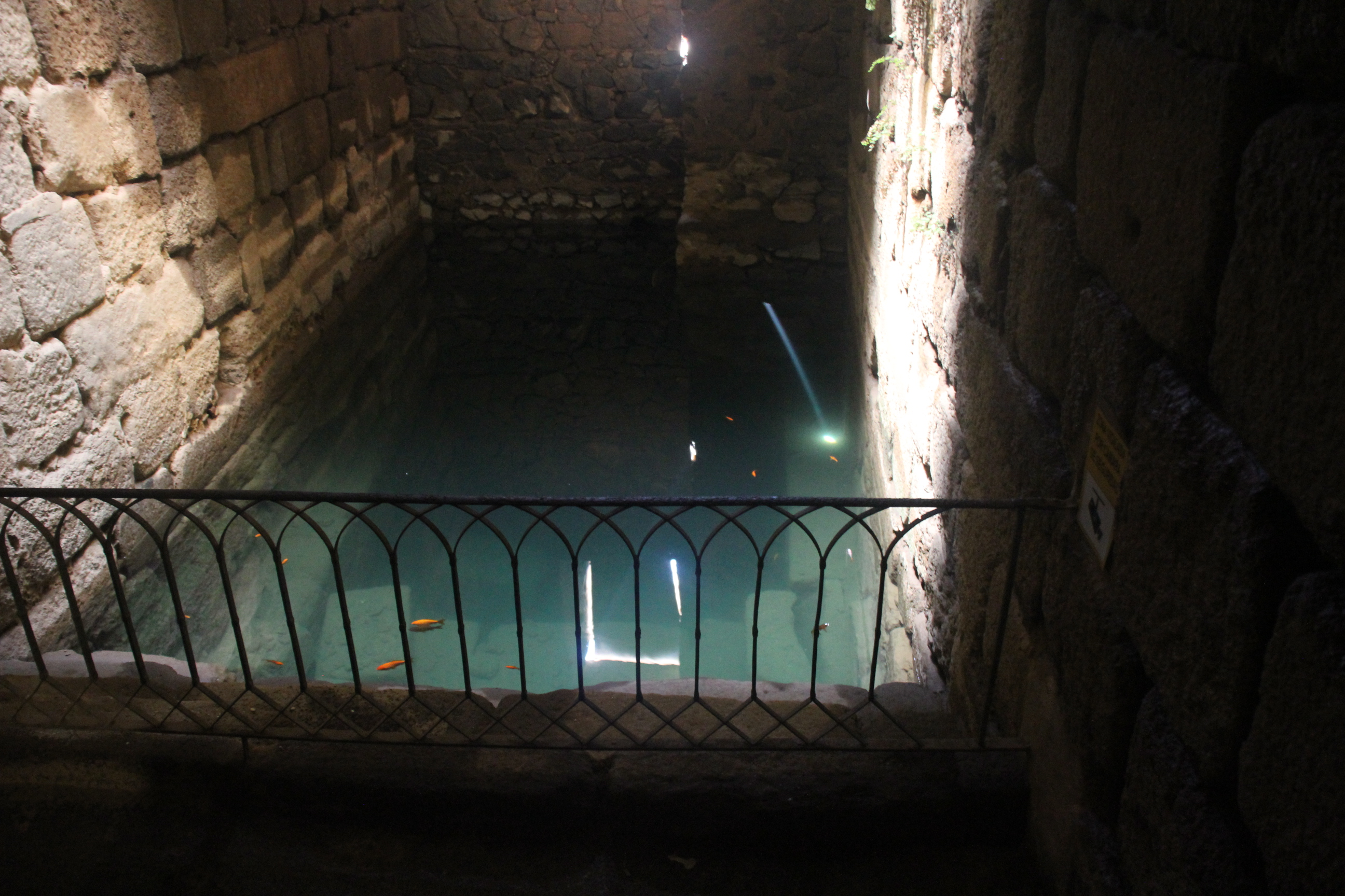 Aljiba Árabe - cisterna